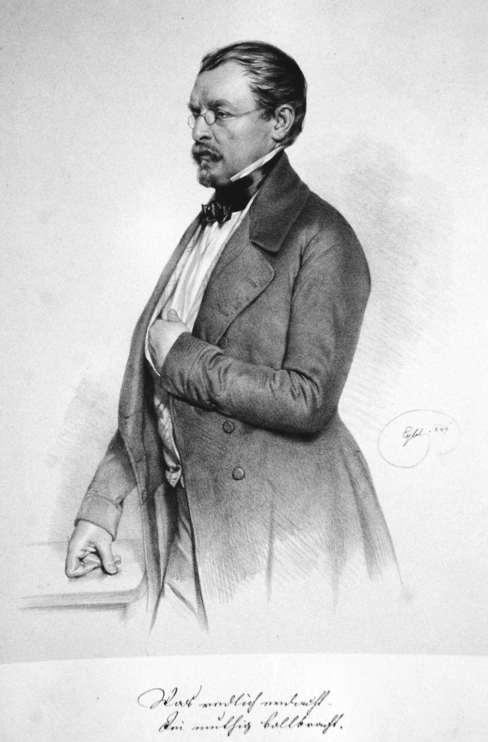 Josef Neumann von Spallart (1797-1880), österreichischer Jurist, Gemeinderat der Stadt Wien, Professor für Handelsrecht. Lithographie von Franz Eybl, 1849